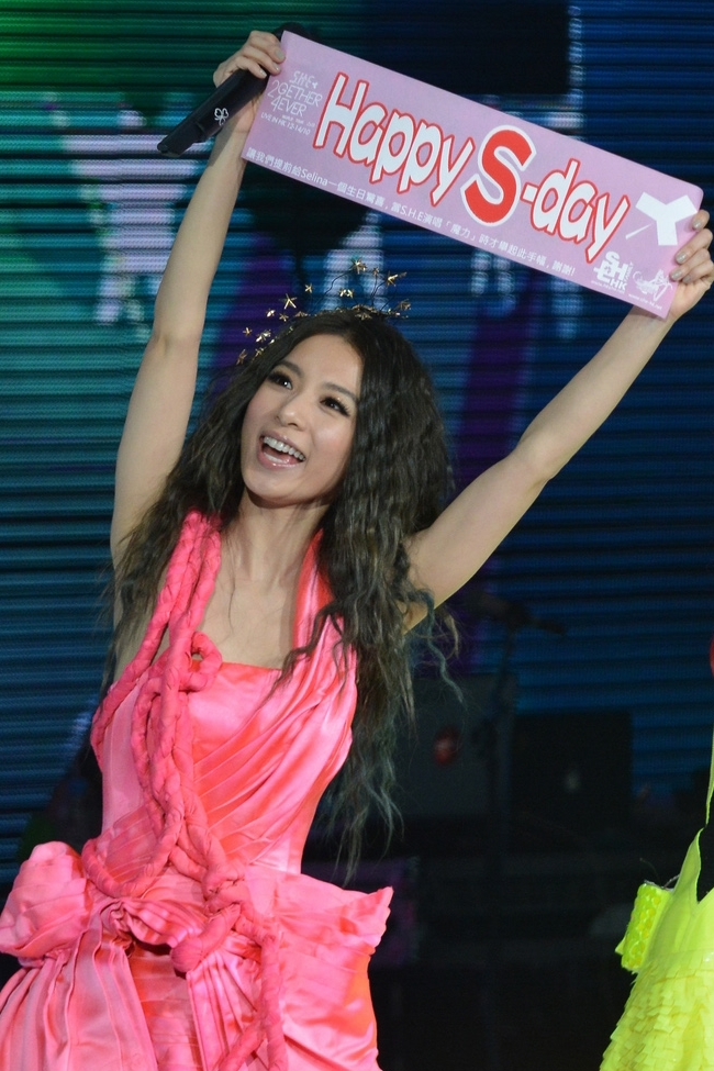 中文（香港）: Together Forever 世界巡迴演唱會香港站 14/11/2013